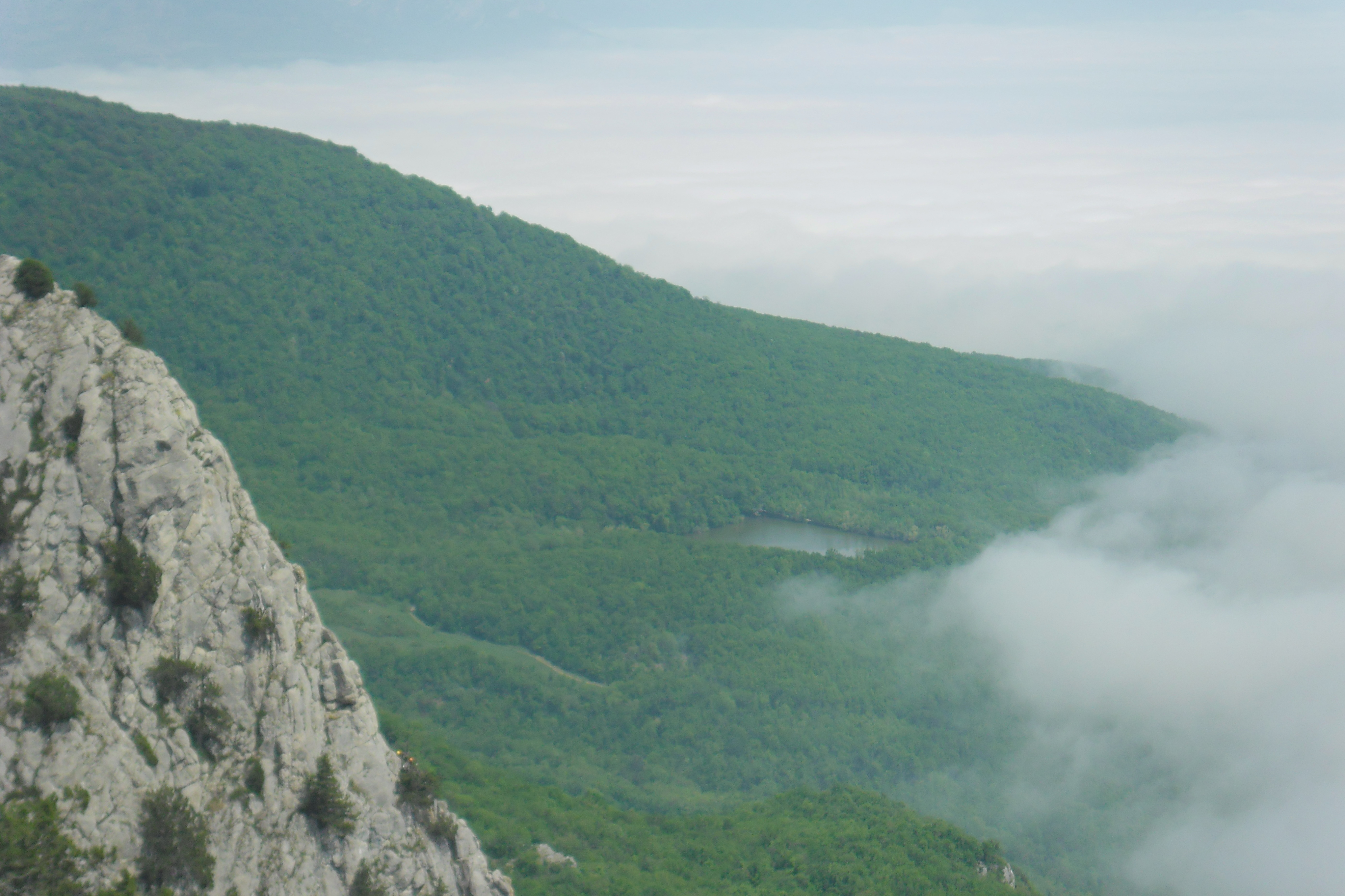 Фото